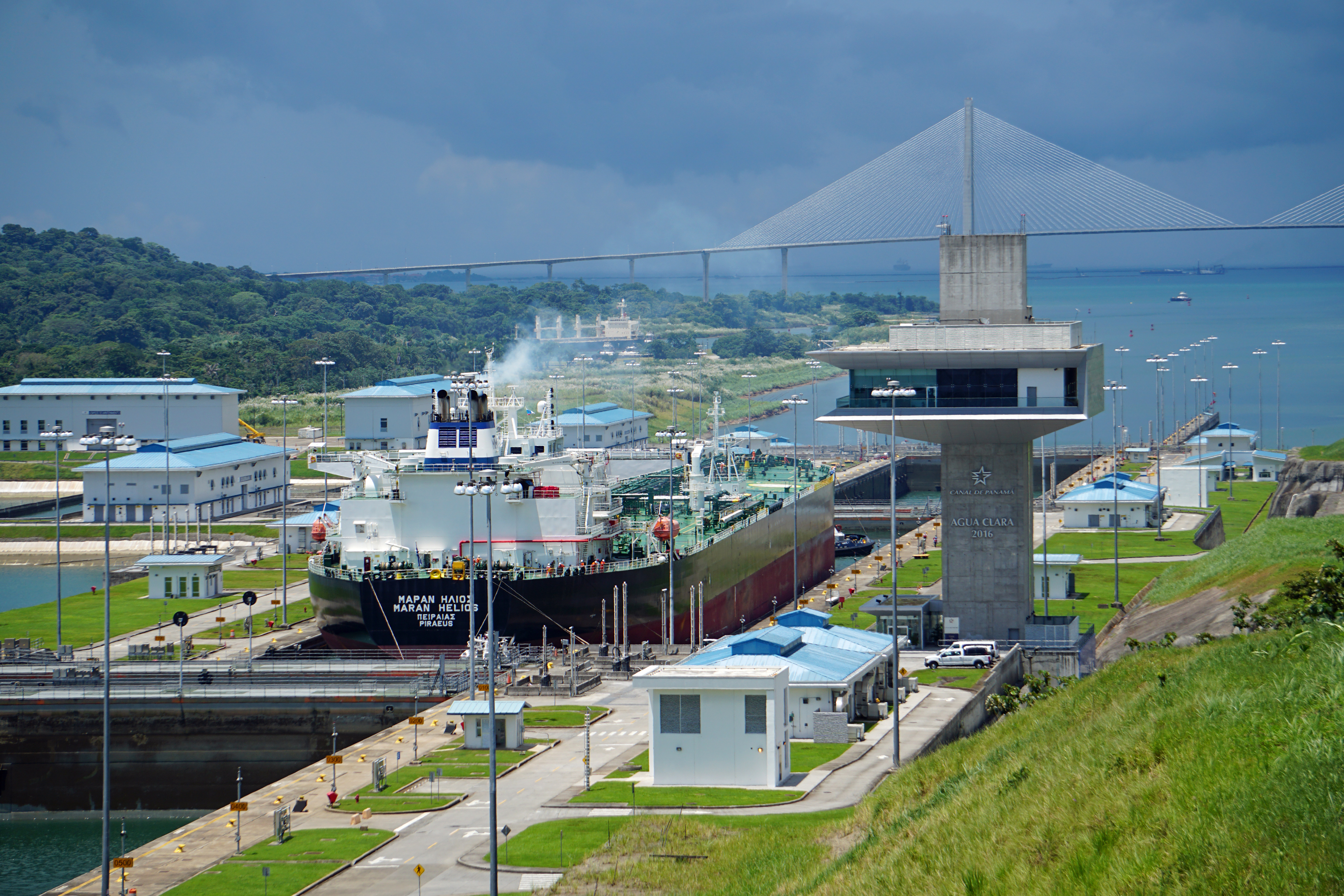 Barco cruzando las Exclusas de Agua Clara, Gatún, Canal de Panamá. A la derecha la Torre de Control de las exclusas.